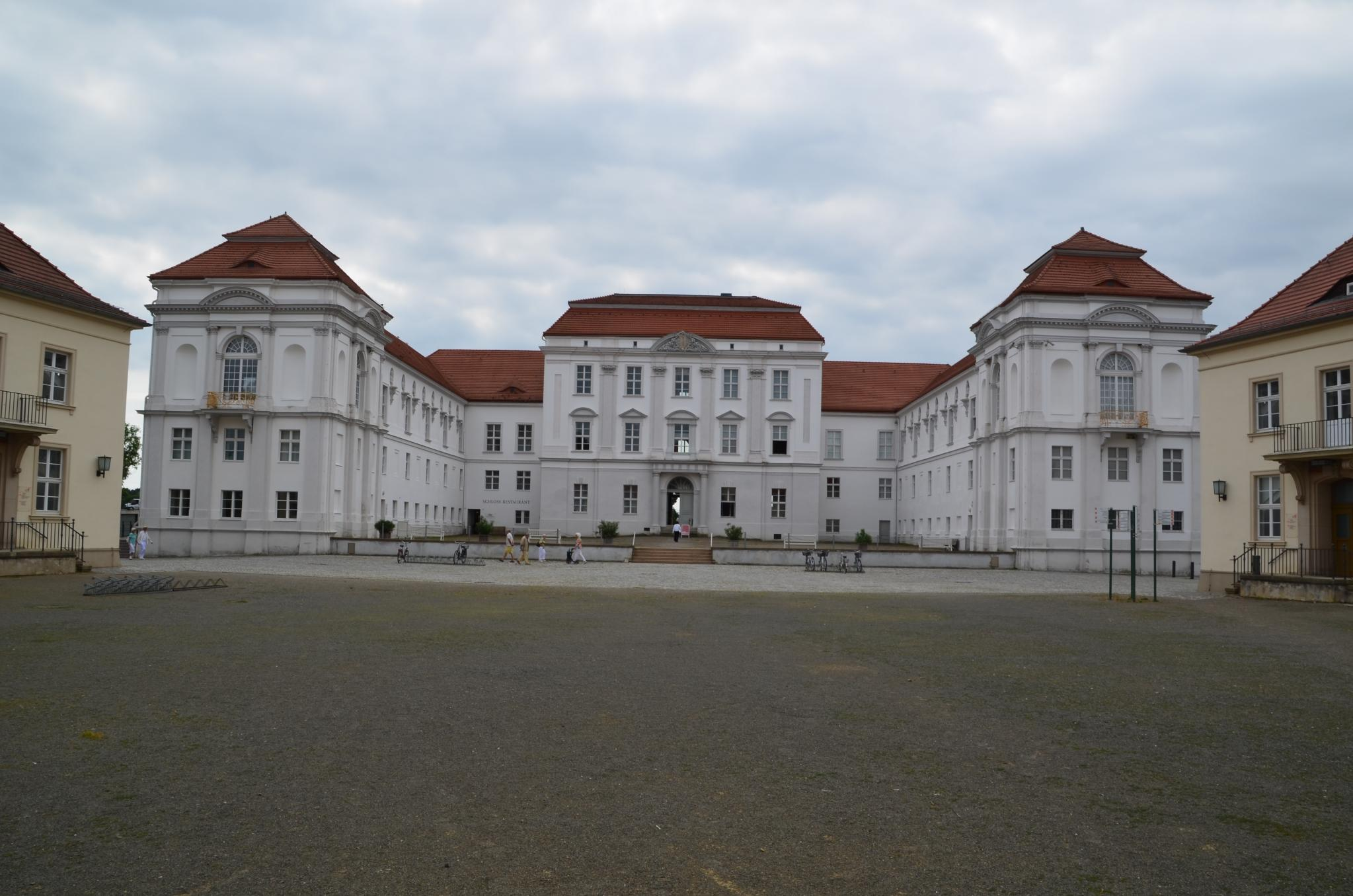 Oranienburg Impressionen